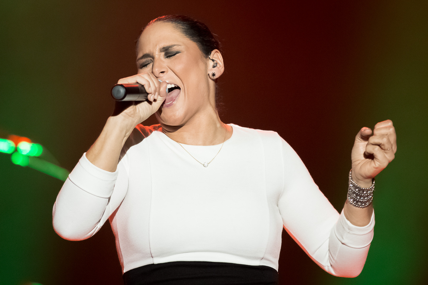 500px provided description: Rosa López Torrevieja [#concert ,#rosa ,#torrevieja ,#ot ,#tve ,#operacion triufo ,#rosa lopez]